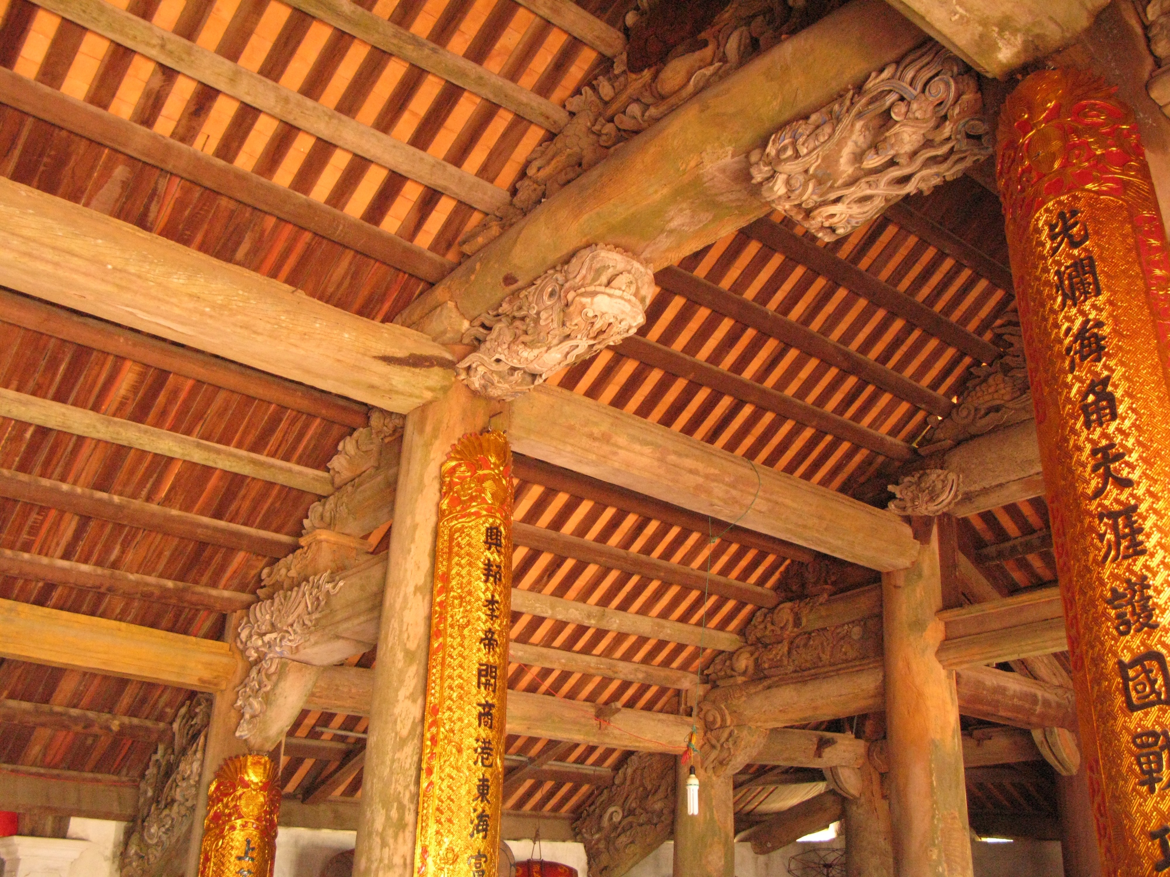 Bên trong đình Quan Lạn. Các cột treo nội dung sắc phong của các vua nhà Nguyễn. Từ phải qua trái: (i) Quang Lạn hải giác thiên nhai hộ quốc chiến công lưu quốc tích (Quang Lạn chốn góc biển bến trời, tổ quốc ghi công chiến công bảo vệ tổ quốc). (ii)Hưng bang Lý đế khai thương cảng đông hải phú cường vạn đại (Vua Lý mở thương cảng để làm đất nước hưng thịnh, miền đông hải giàu mạnh muôn đời).